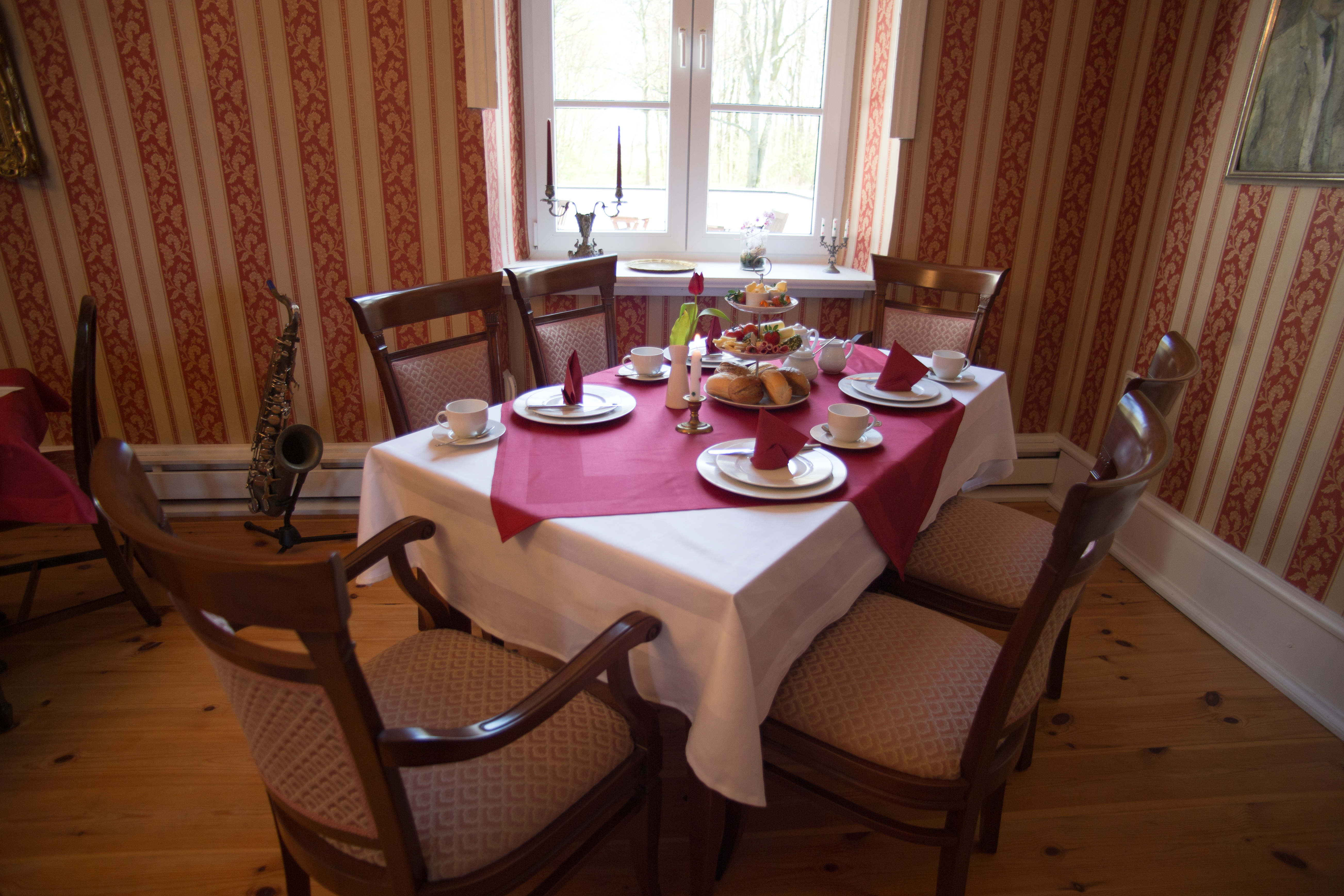 Lecker